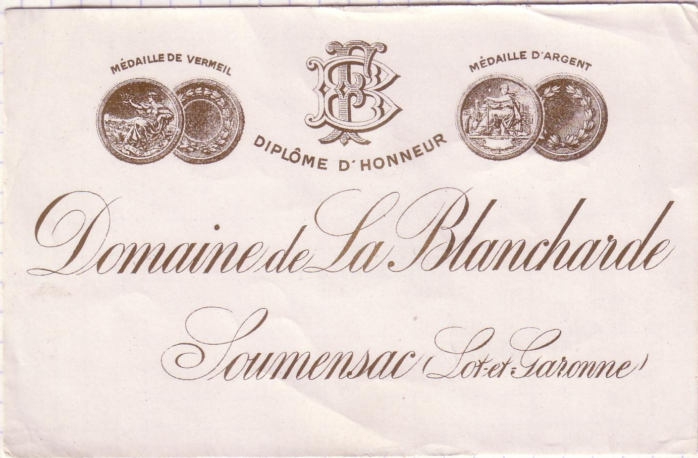 Étiquette de vin du domaine de la Blancharde Date fin XIX Lieu : Soumensac Lot .